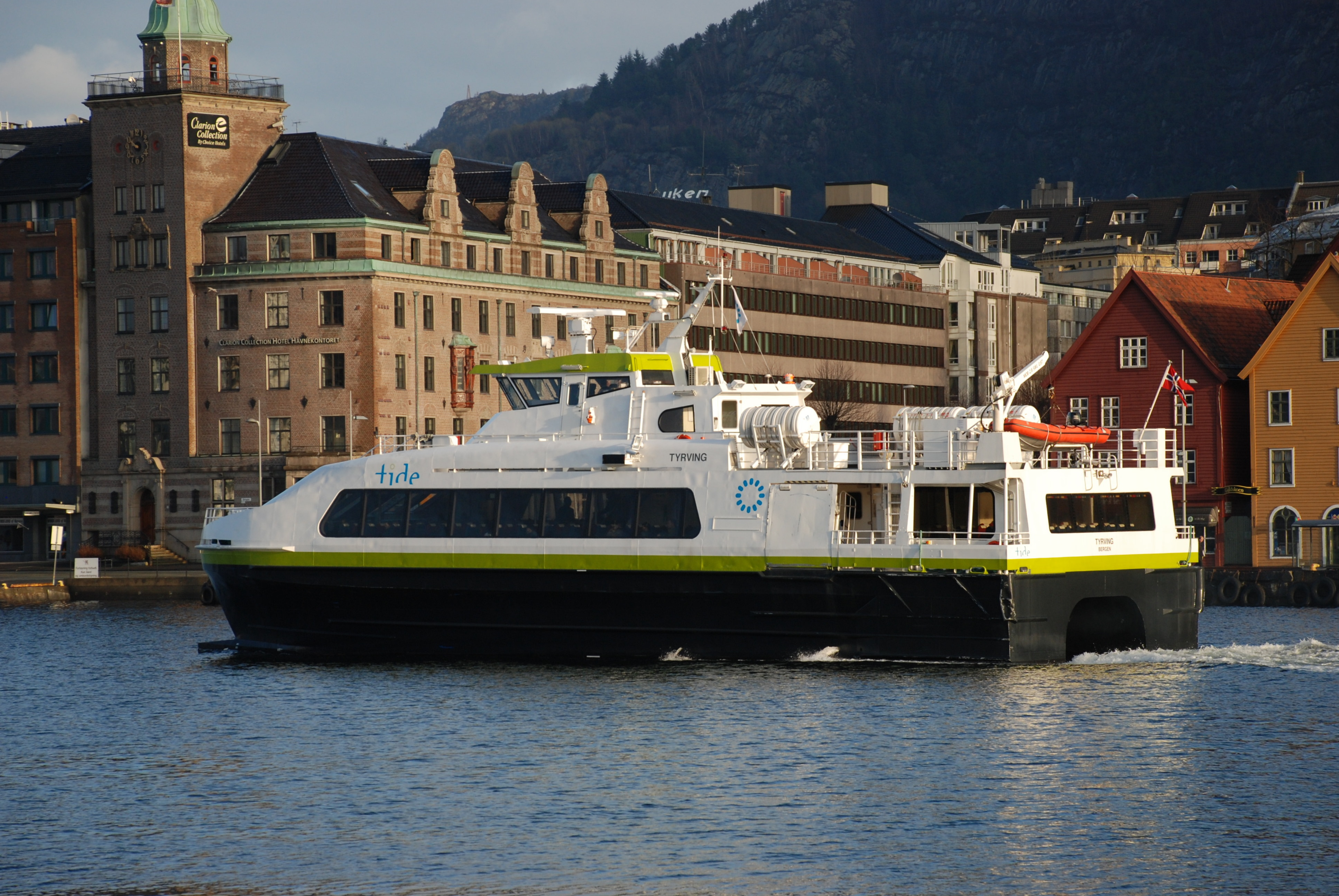 MS Tyrving i Flaggruten. På vei fra Bergen. Foto Harald Sætre.